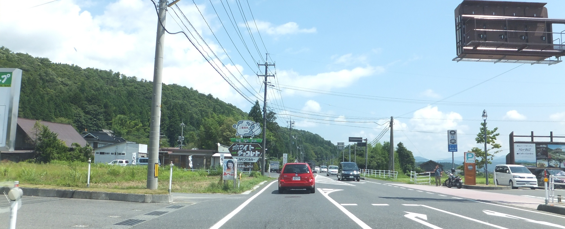 岡山県真庭市蒜山上徳山 国道482号